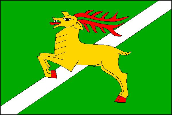 Vlajka obce Žďárky